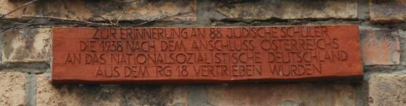 RG18 Erinnerung 1938